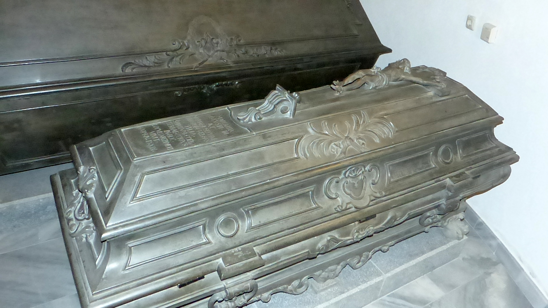 Sarkophag für Maria Margareta, Tochter von Friedrich August II. und Maria Josepha von Österreich, in der Stiftergruft der Wettiner Gruft in der Katholischen Hofkirche, Dresden